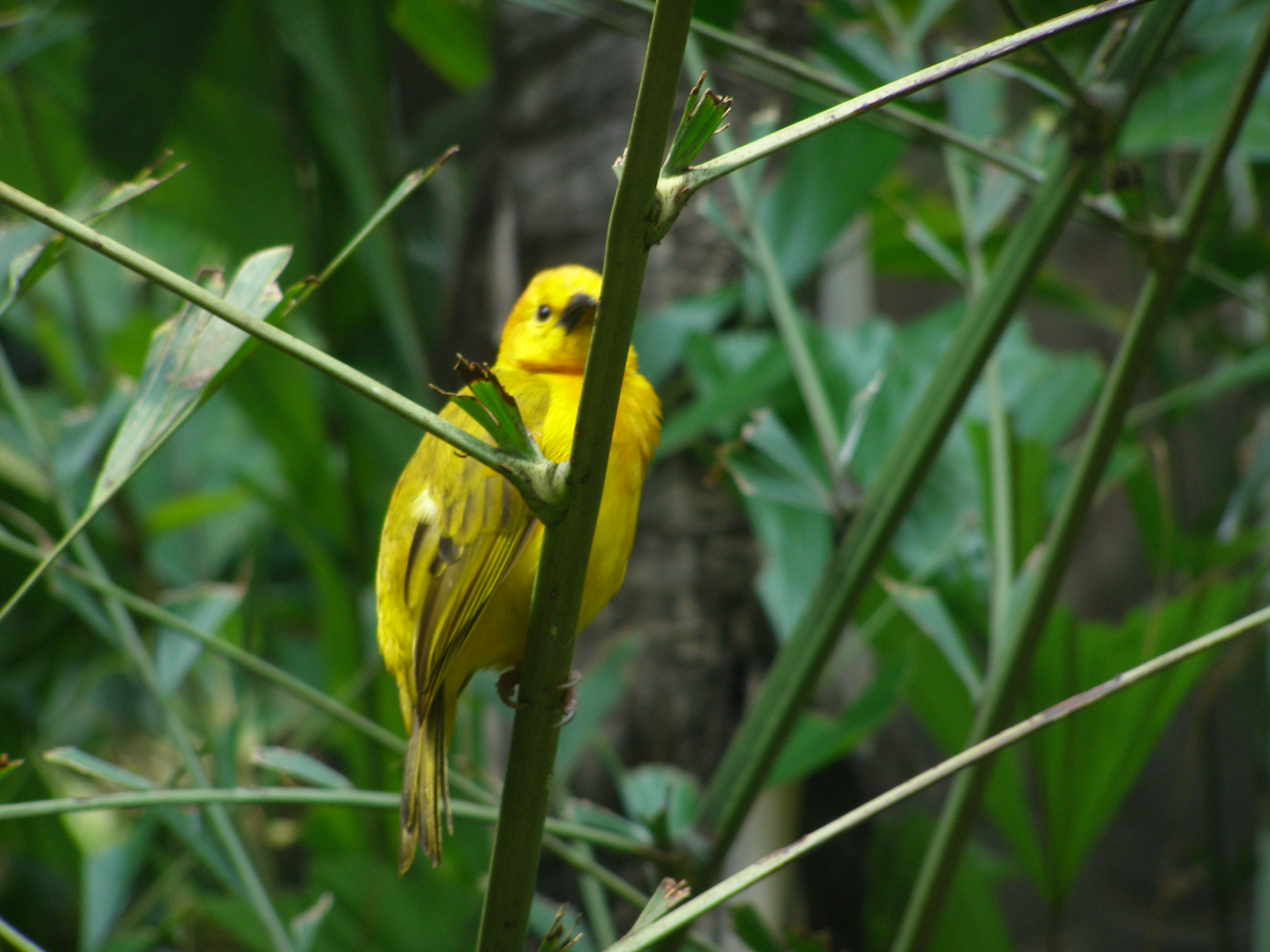 wikłacz rdzawogłowy